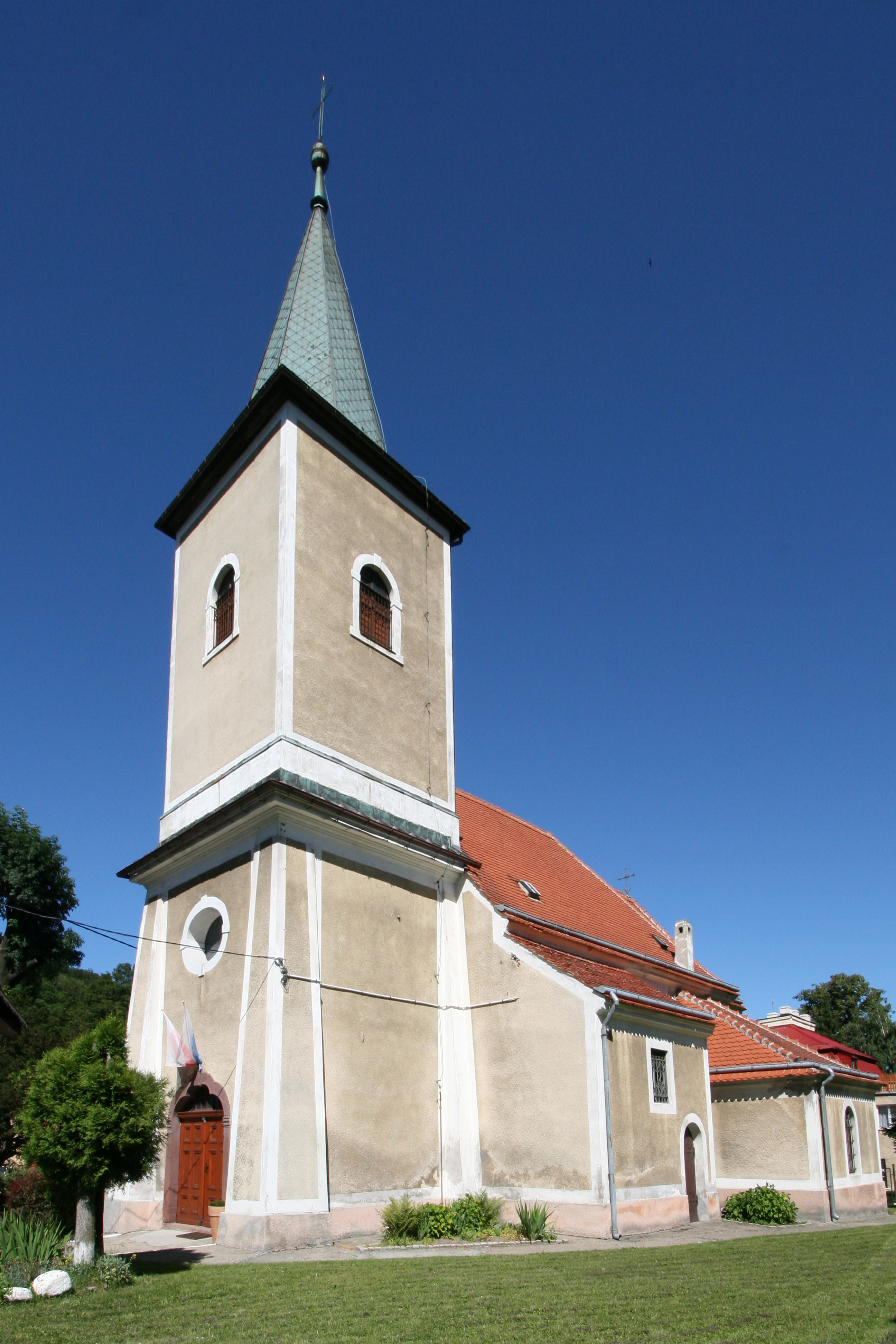 Walim, kościół par. p.w. św. Barbary, XVI, XVIII, XIX/XX